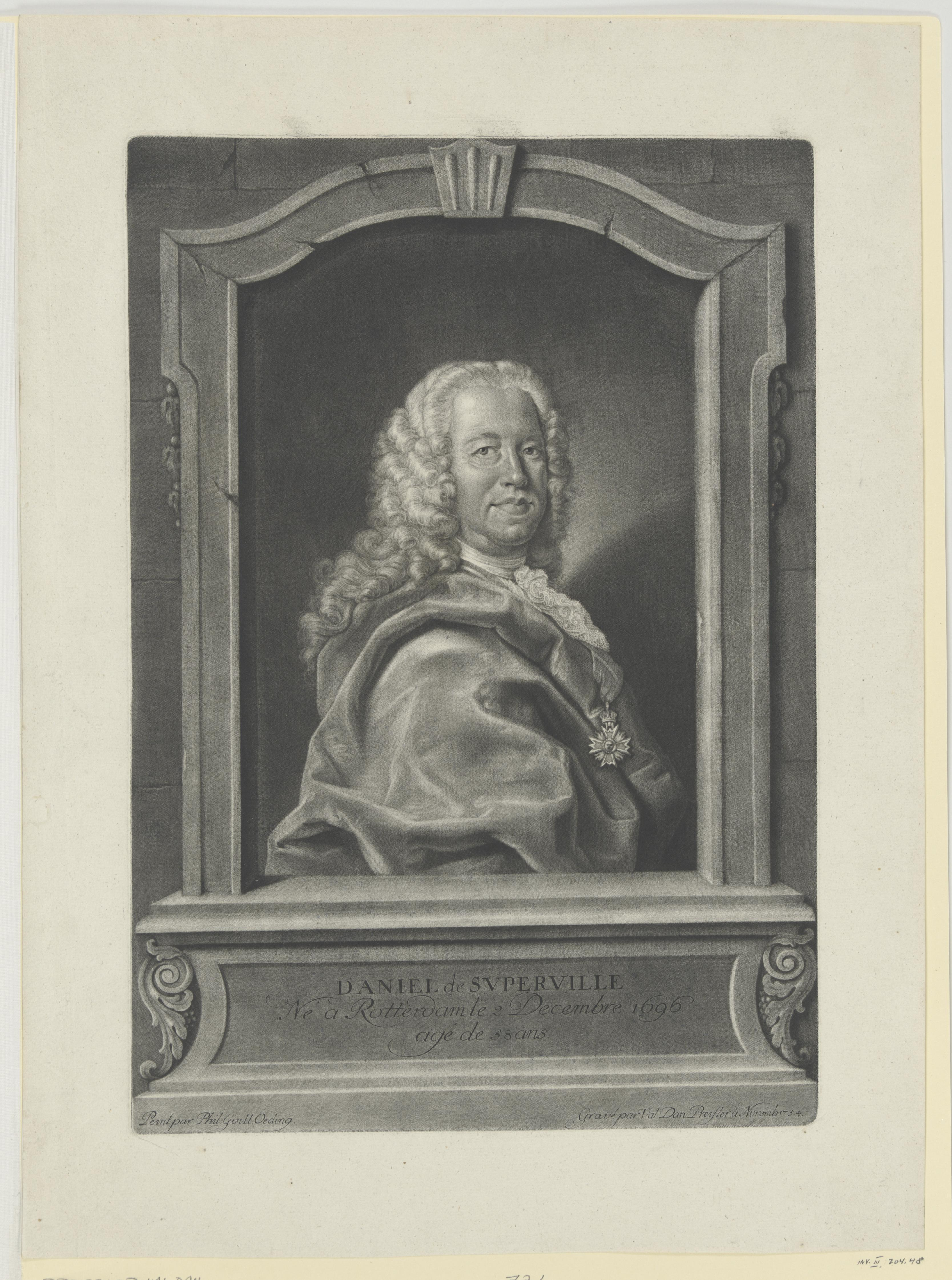 Bildnis des Daniel de Superville, Valentin Daniel Preißler, Schabkünstler faktischer Entstehungsort: Nürnberg, 1754 Schabkunst Coburg, Kunstsammlungen der Veste Coburg, Inventar-Nr. III,204,48, Mappe 18, Passepartout 9 Nachstich von: Oeding, Philipp Wilhelm, Bild Literatur: Mortzfeld A 21535